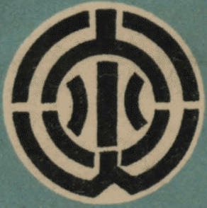 淡水街紋章 Bân-lâm-gú: Tām-chúi-ke ê bûn-chiong